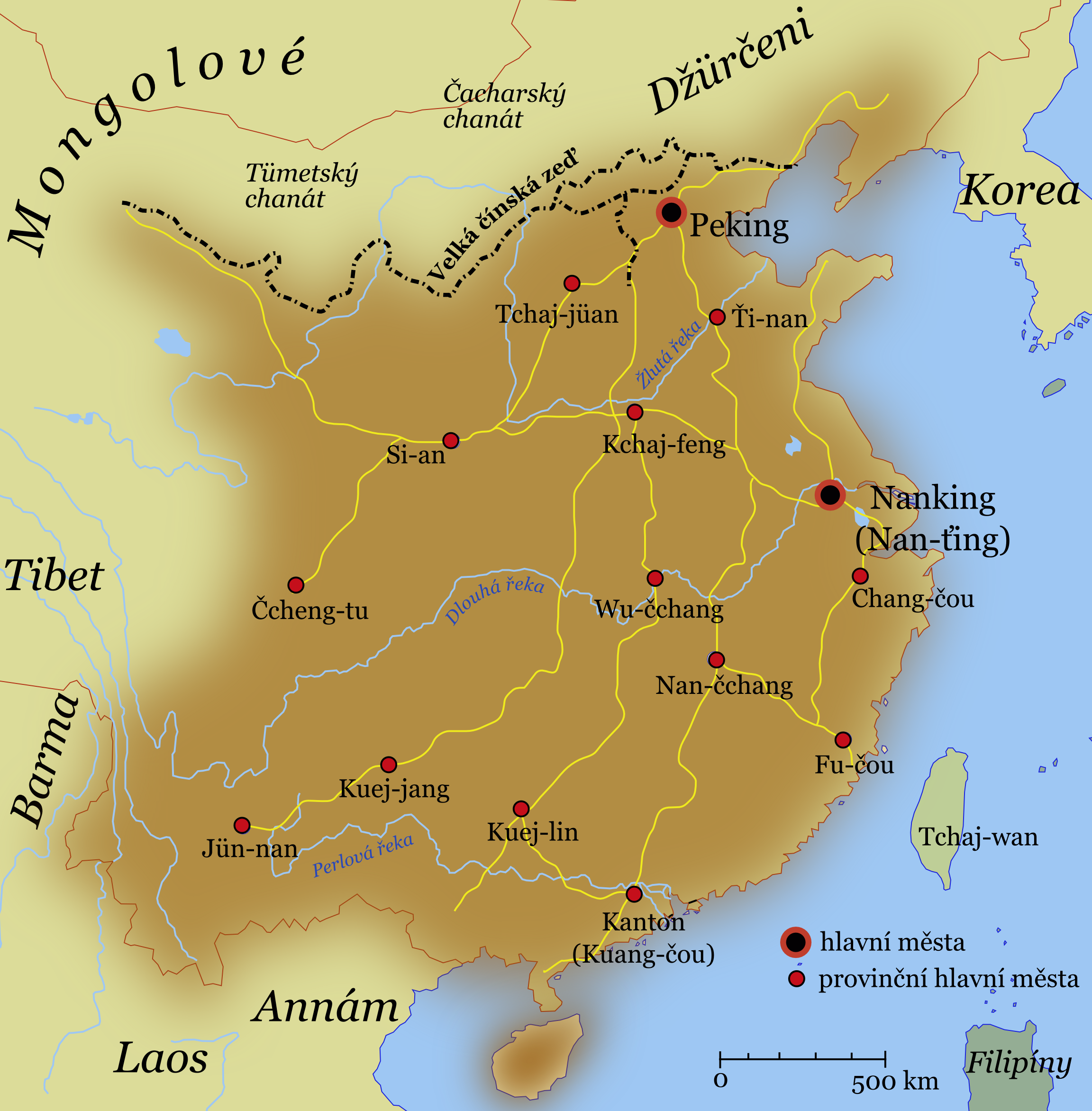 Čína za dob dynastie Ming (1368–1644), stav k roku 1580.